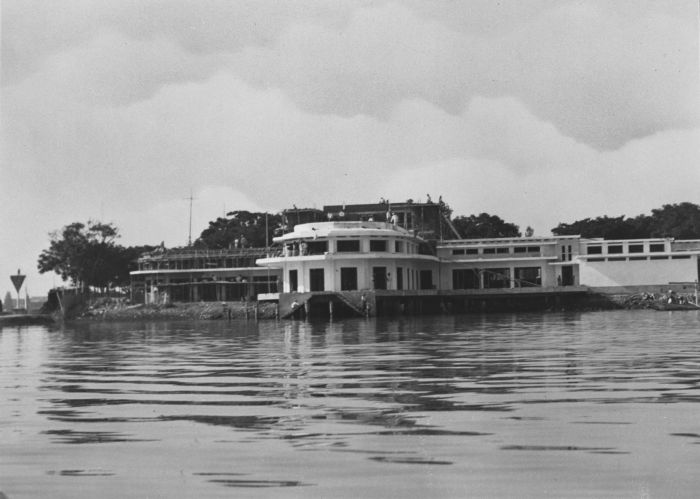 Foto. Het nieuwe gebouw van de marinesociëteit Modderlust in Soerabaja in aanbouw